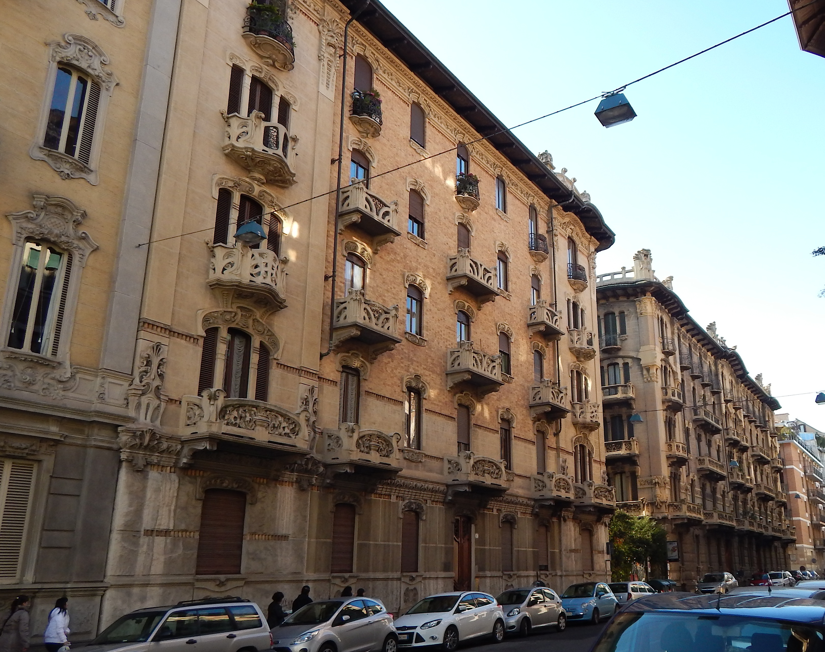 Una veduta del quartiere torinese Cit Turin